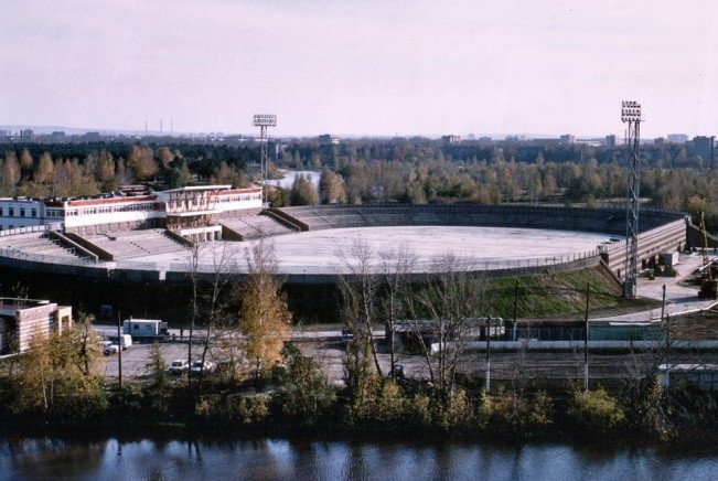 Стадион "Труд"